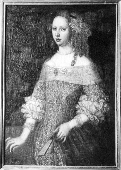 Målning av Friherrinnan Brita Cruus av Gudhem, född 1641, död 1716, dotter till Johan Jespersson Cruus. gift 17/3 1657 med majoren Jacob Lilljehöök af Fårdala, född 1633, död 1657. Ägare till ett flertal gårdar i Järfälla, bl a Jakobsbergs gård.